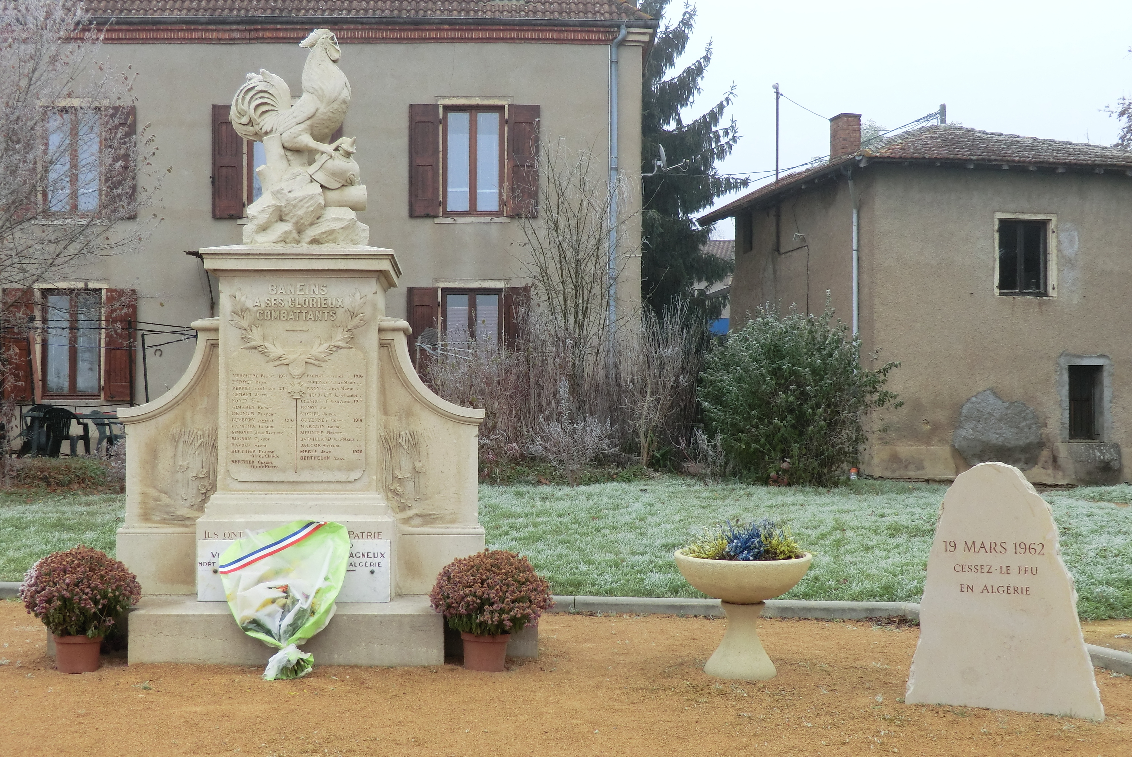 Monument aux morts de Baneins et stèle du cessez-le-feu en Algérie.